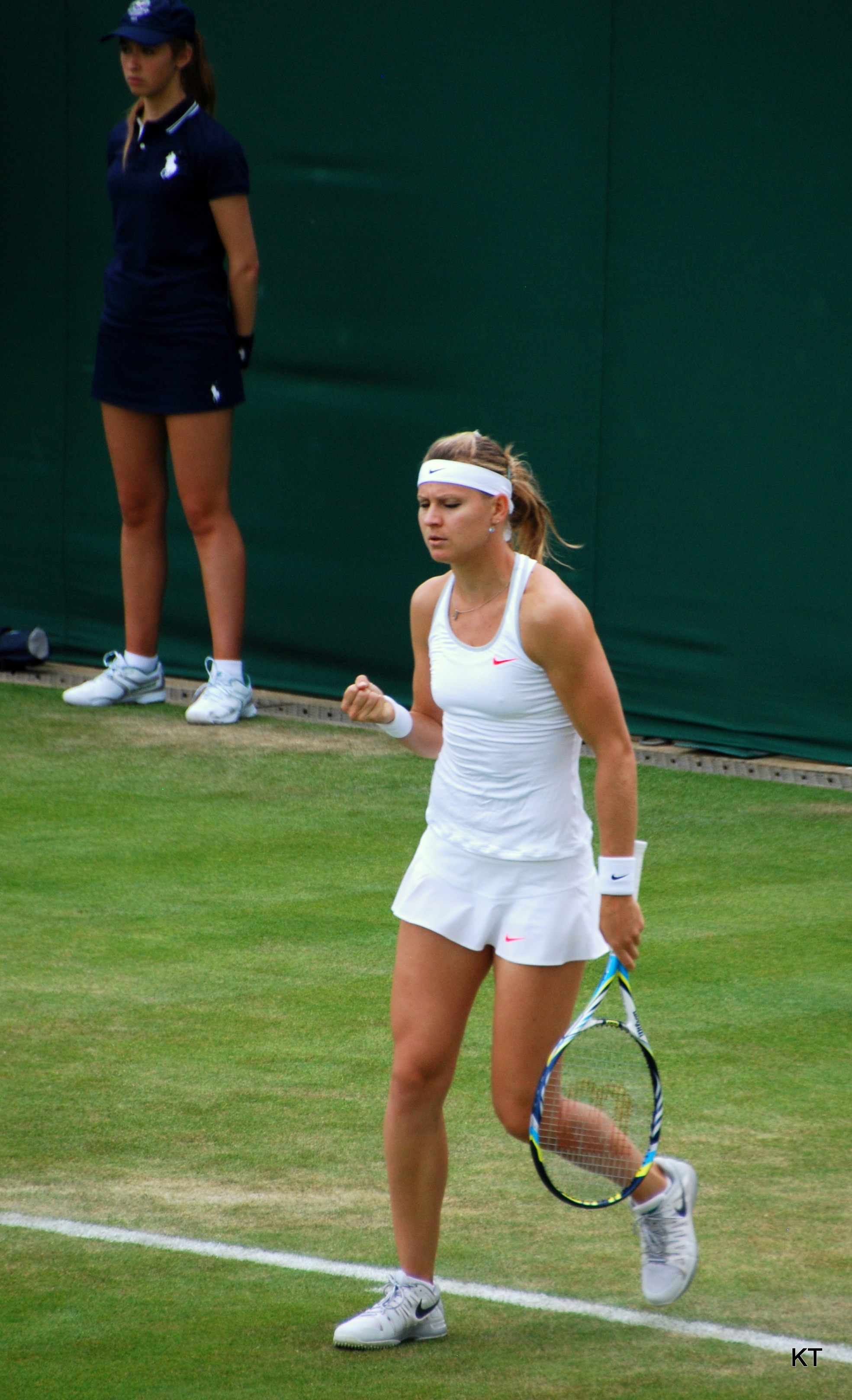 Lucie Safarova